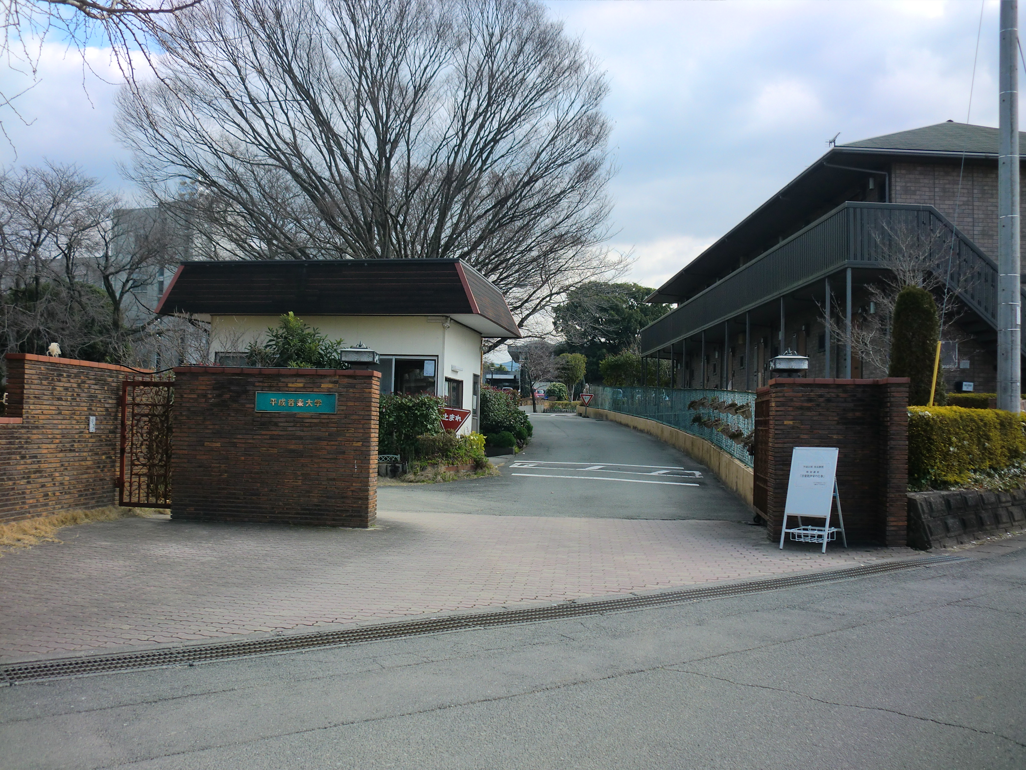 熊本県上益城郡御船町にある平成音楽大学